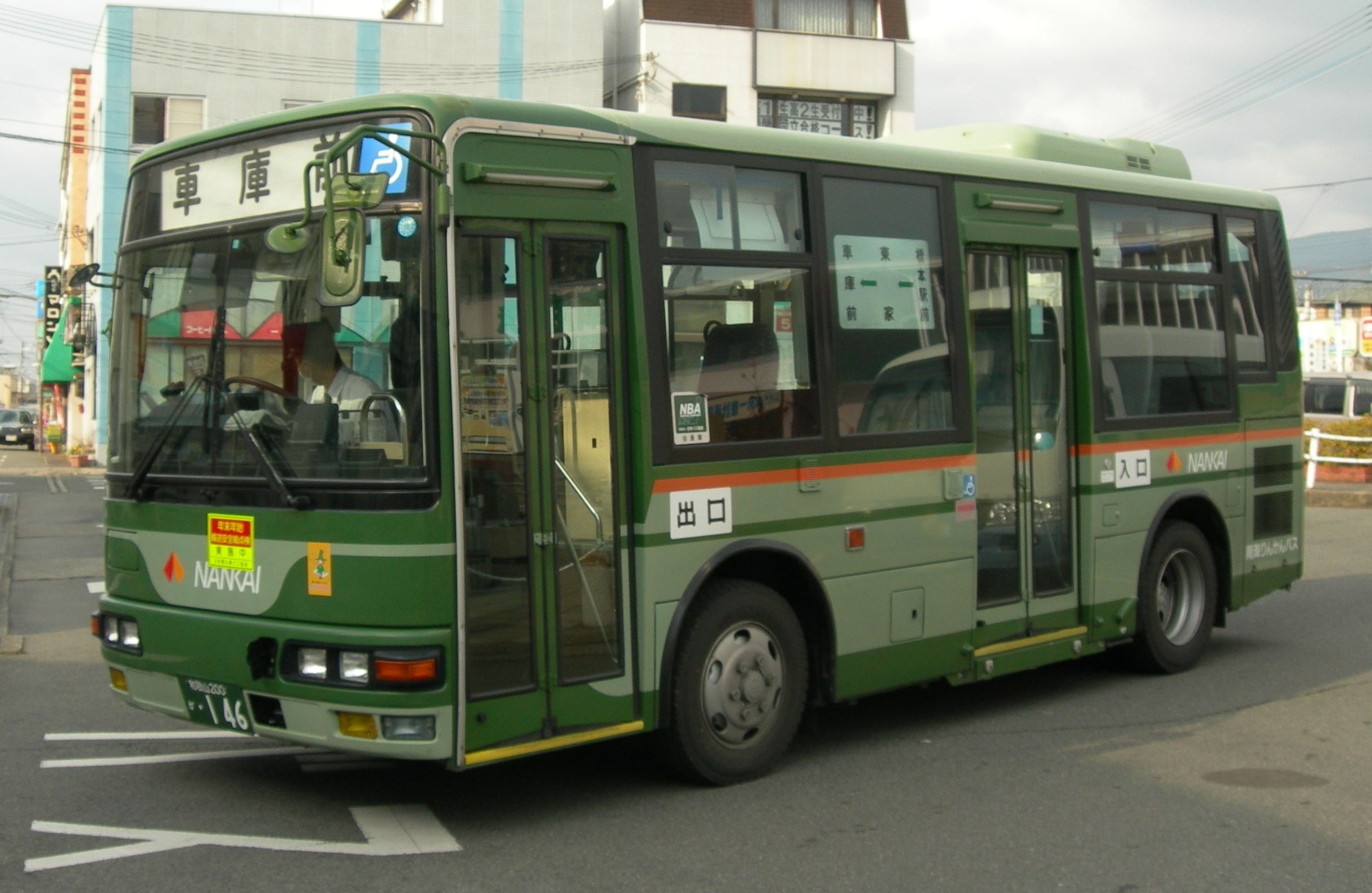 南海りんかんバス